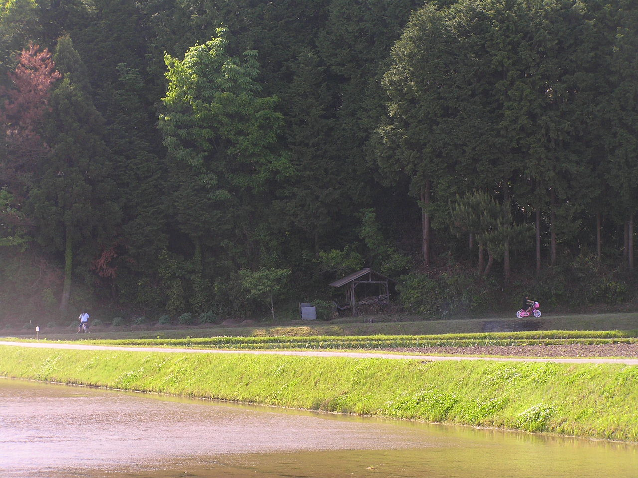 田園風景